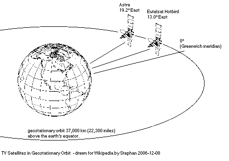 Skizze TV Satelliten in geostationaerem Orbit